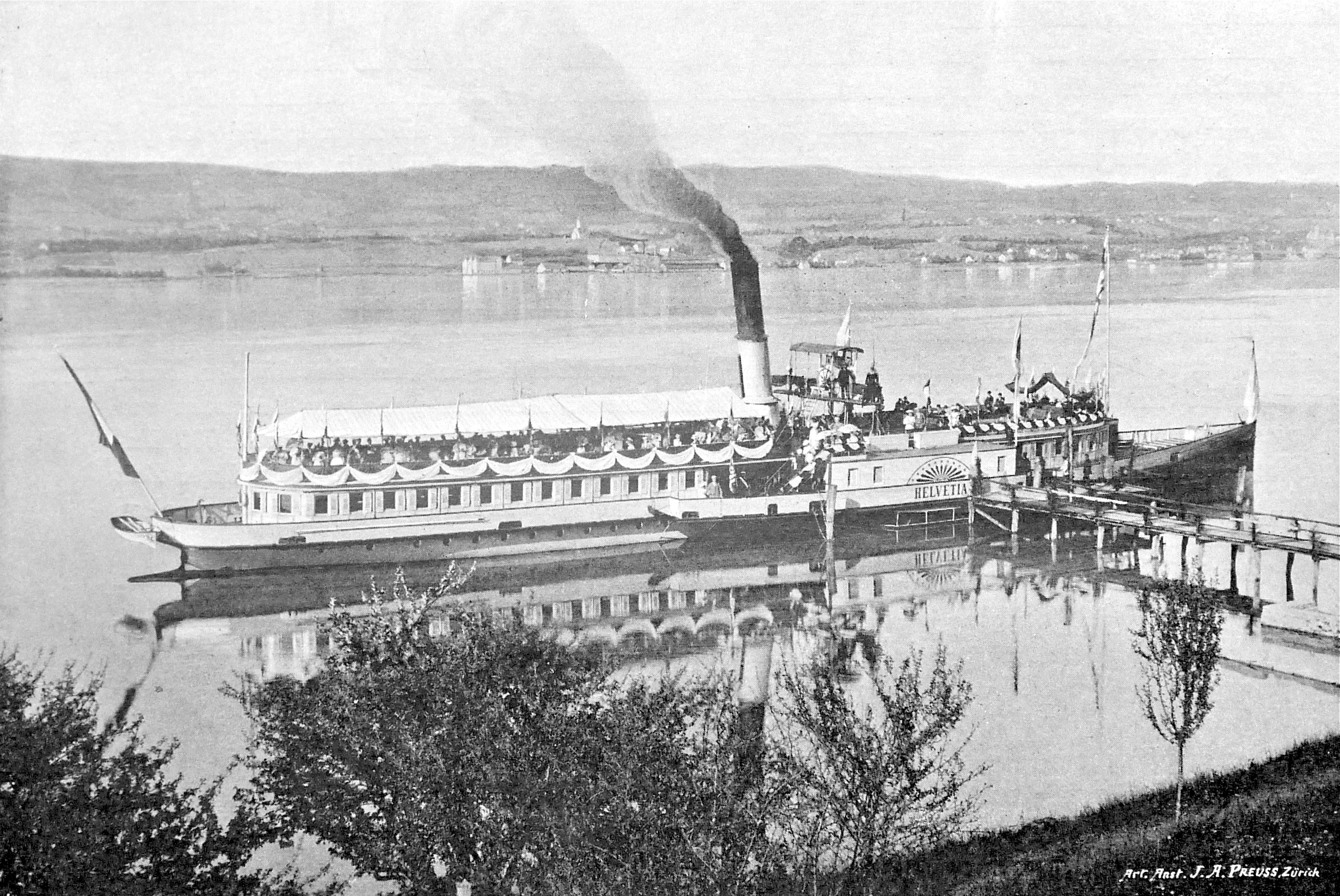 Salondampfer Helvetia